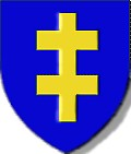 Herb Jagiellonów author -Maciej Szczepańczyk user-Mathiasrex